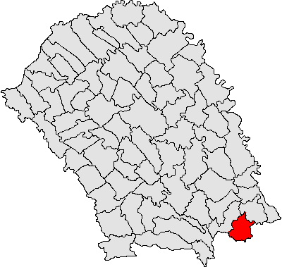 Categorie:Hărţi ale judeţului Botoşani